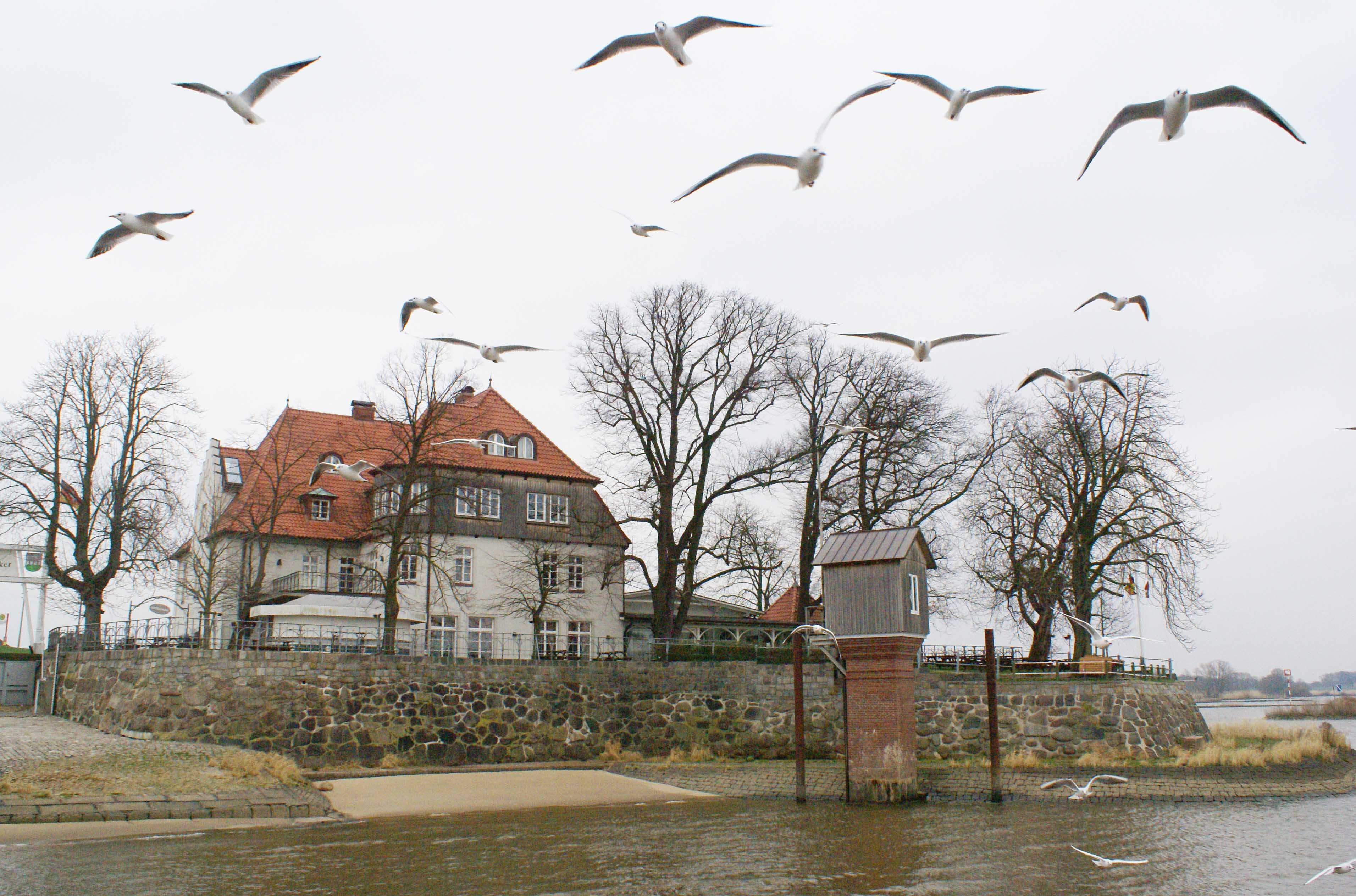 Zollenspieker Fährhaus und Pegelhaus an der Elbe, Hamburg, DeutschlandThis is a photograph of an architectural monument. und 919